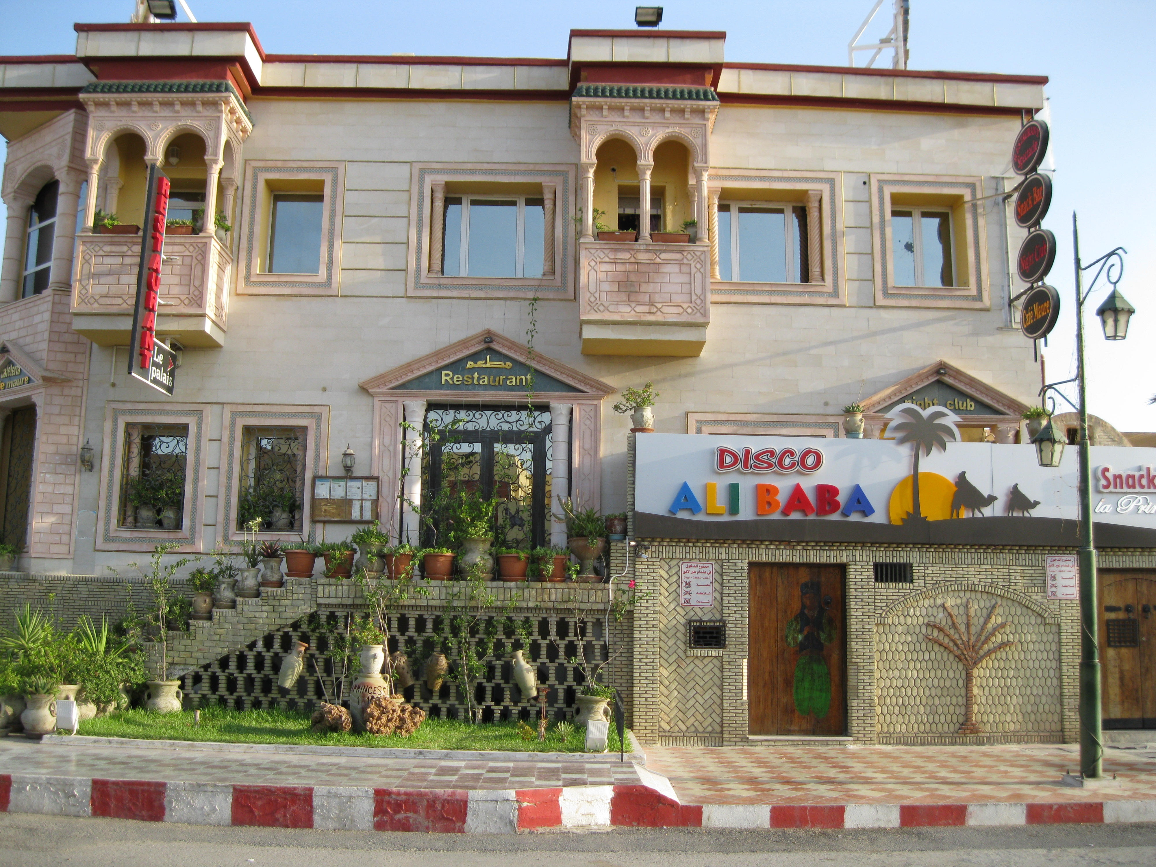 resto le palais